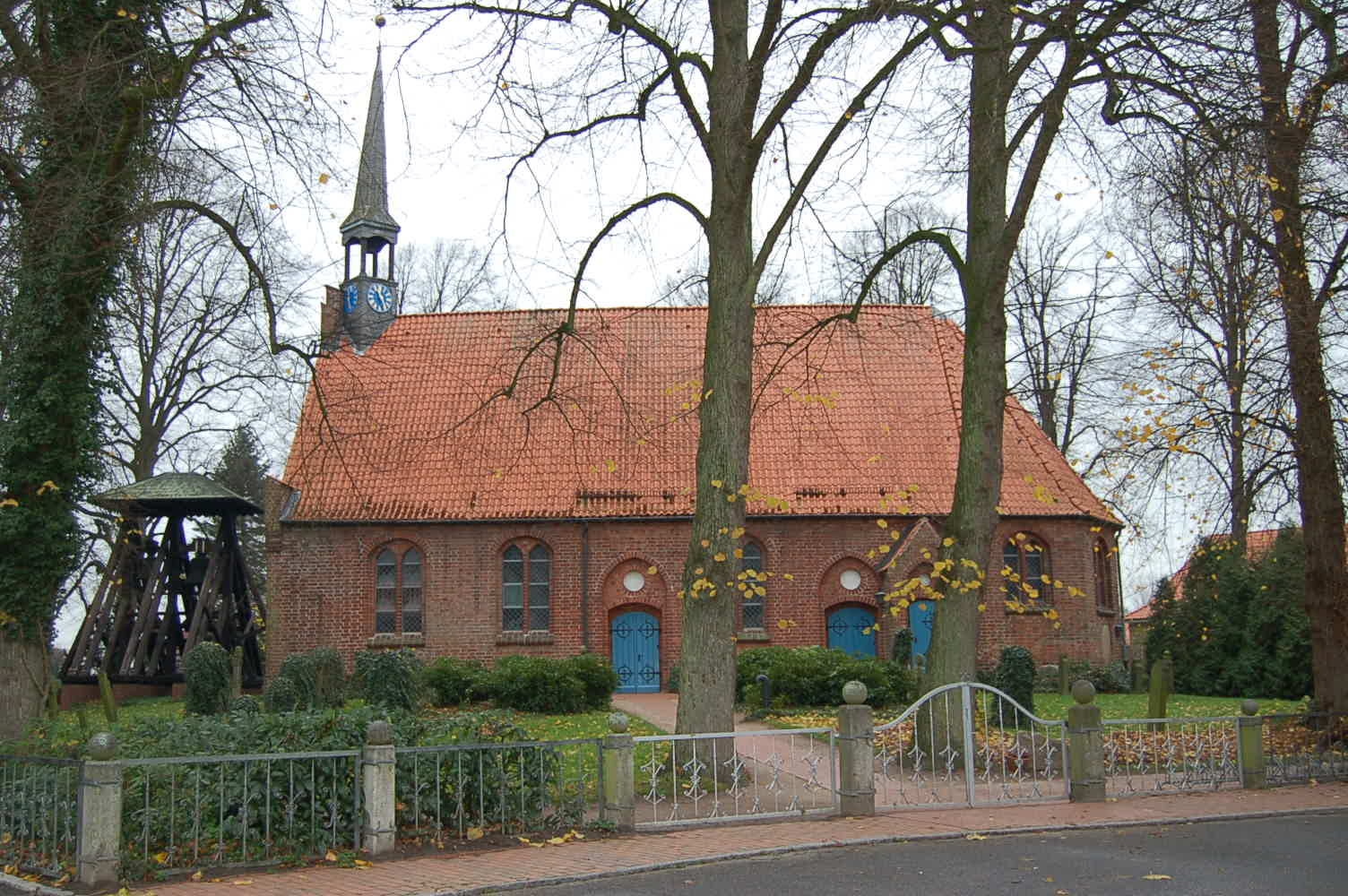 St.-Johannes-Kirche Seester